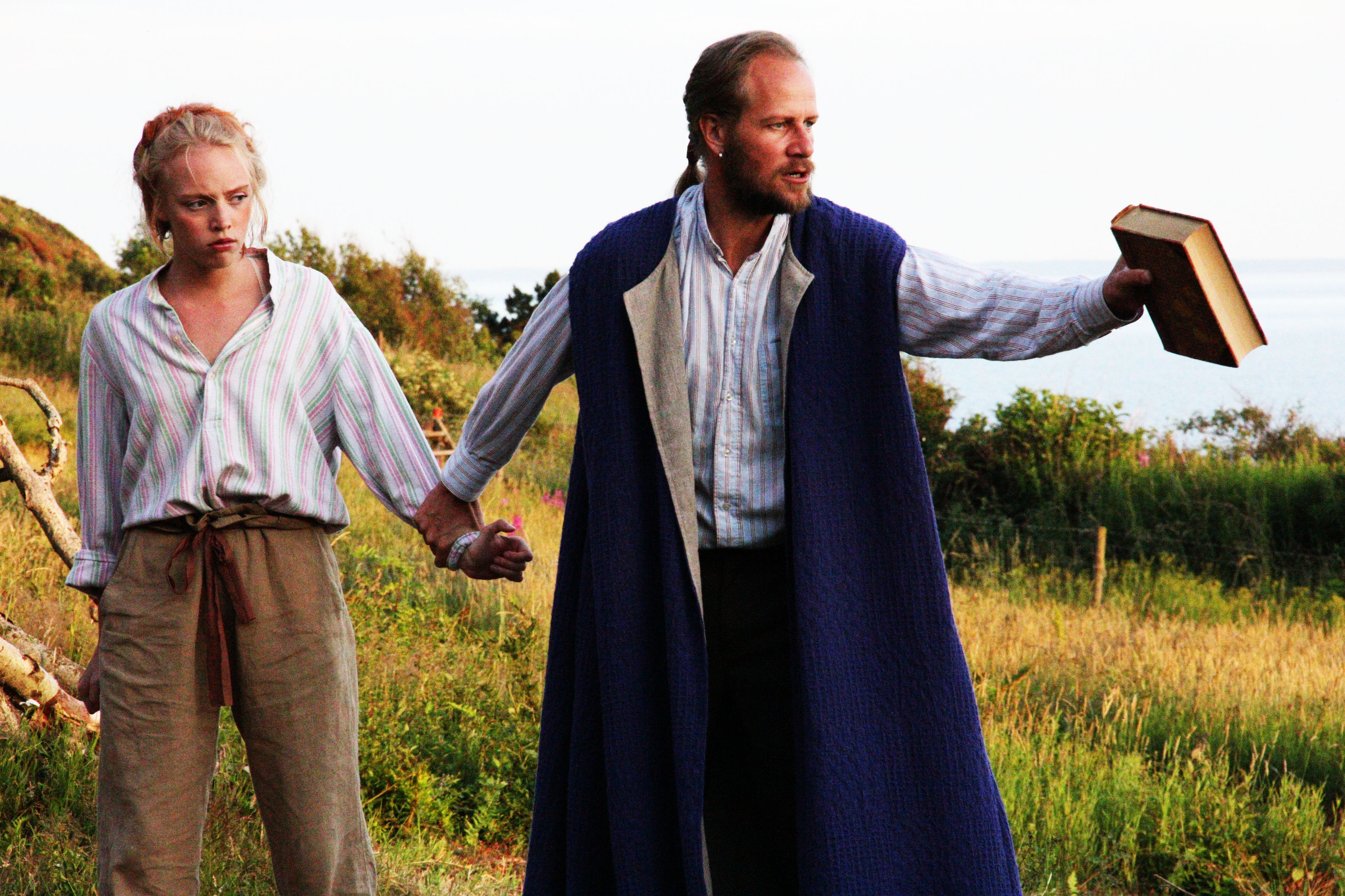 Agnes Persson och Jens Olsson i Stormen på Kullaberg, sommaren 2012.